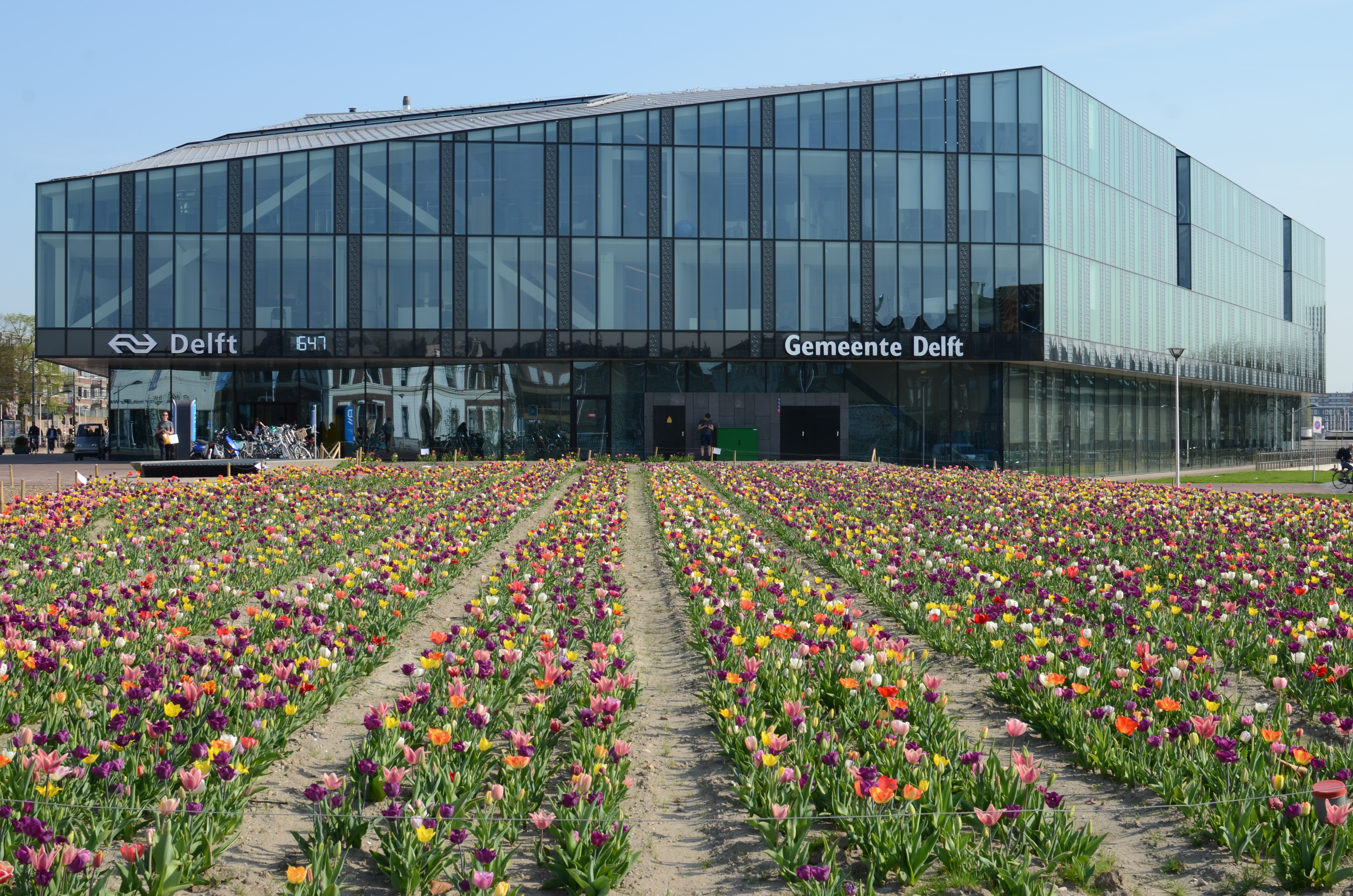 Tulpen rondom station Delft, april 2018.